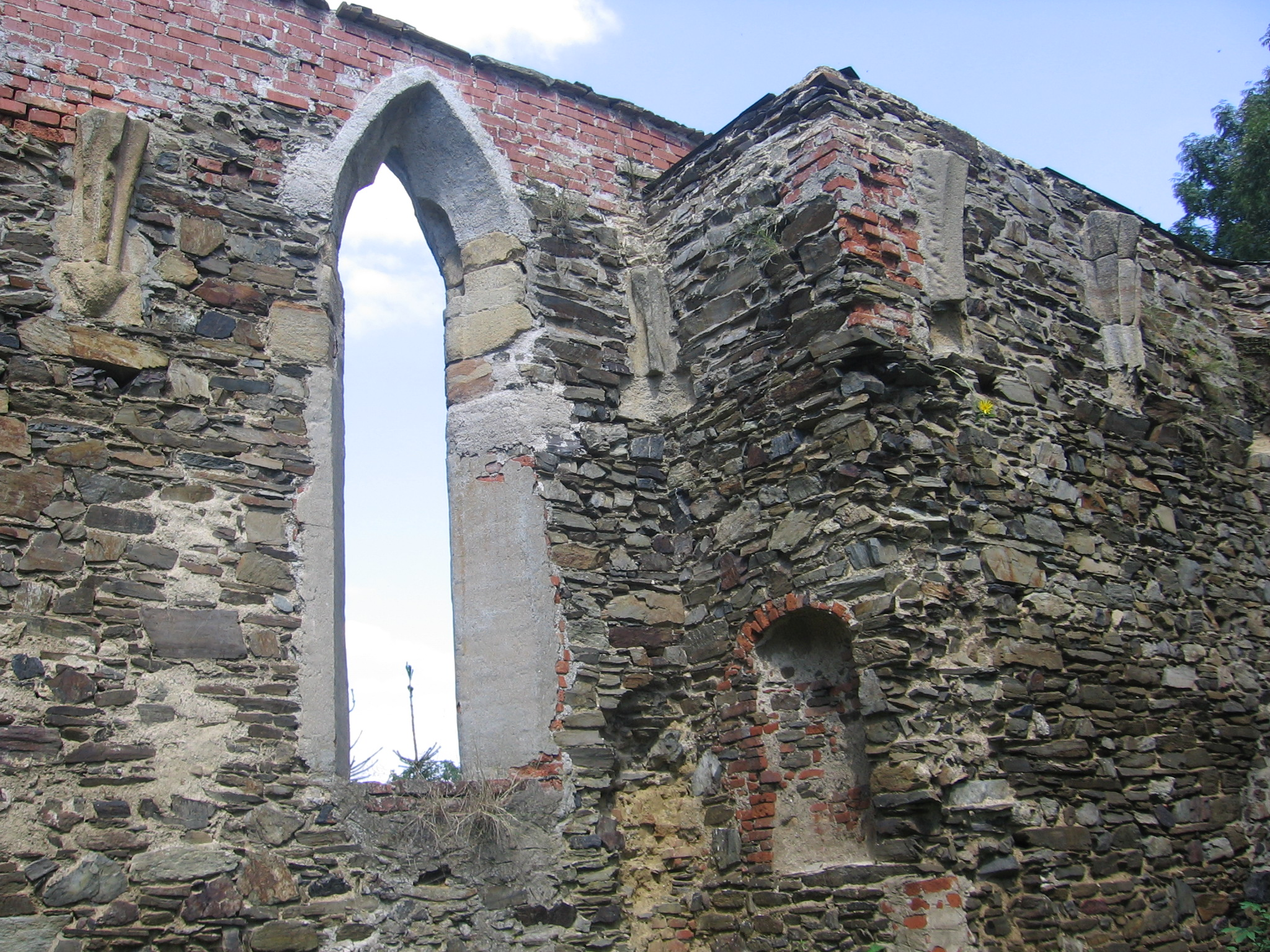 Zřícenina kostela sv. Markéty, Poleň, okr.Klatovy